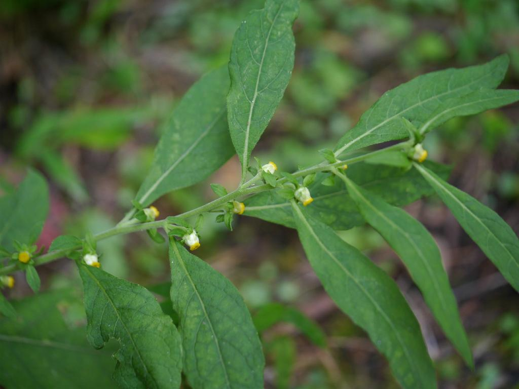 Carpesium abrotanoides：ヤブタバコ 2014/09/21 和歌山県田辺市：Tanabe City. Wakayama Pref. Japan